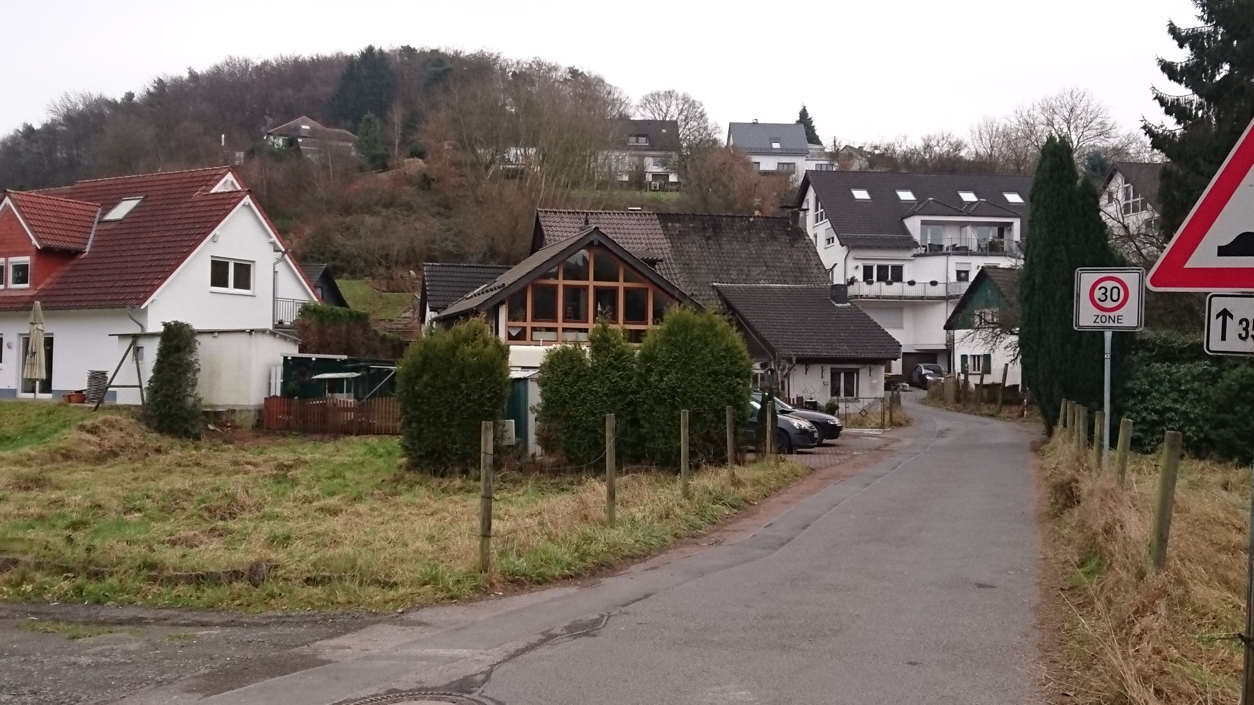 Einfahrt nach Steeg (Overath)